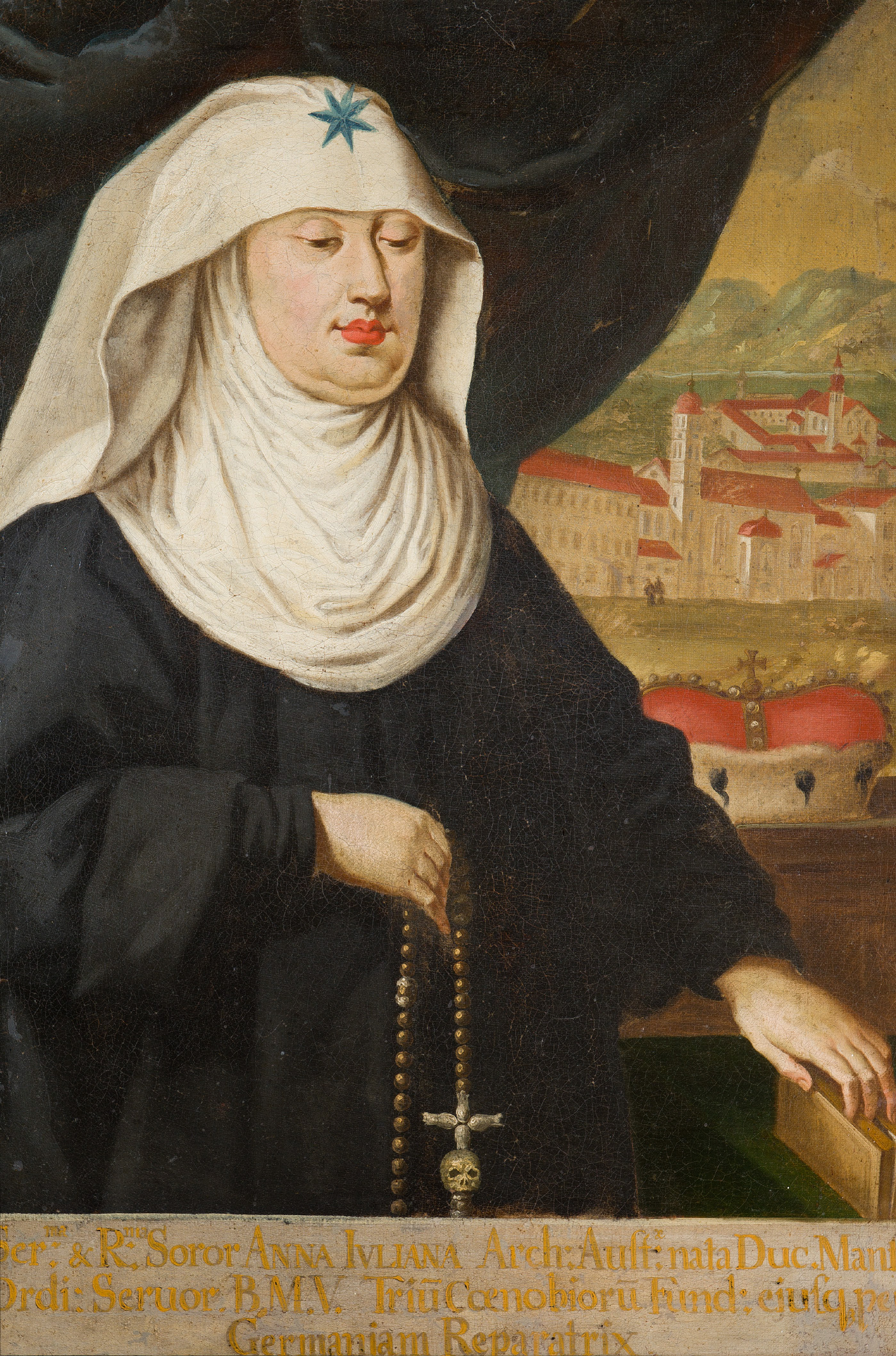 Erzherzogin Anna Katharina (1566-1621) im Ordenskleid der Serviten